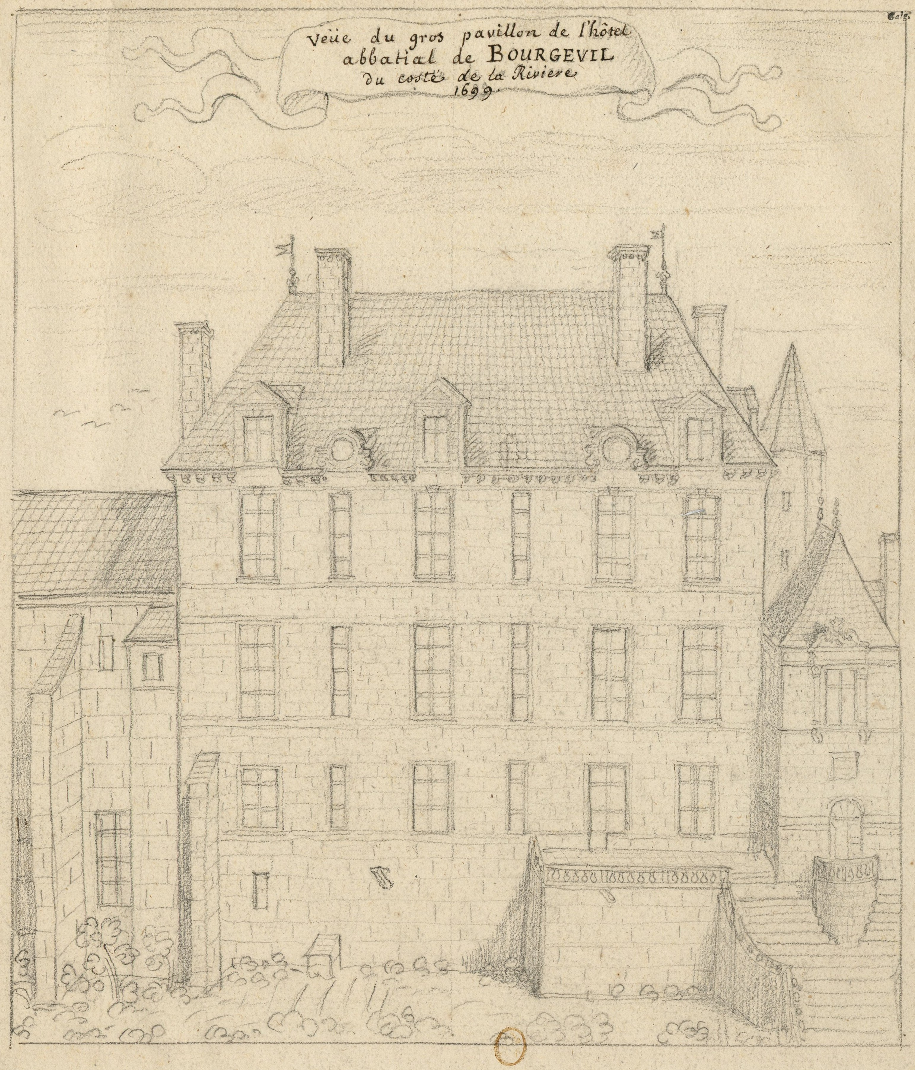 abbaye de Bourgueil Anjou Famille Le Clerc